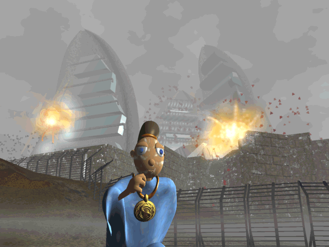 Capture d'écran du jeu vidéo Little Big Adventure (1994), développé par Adeline Software International.